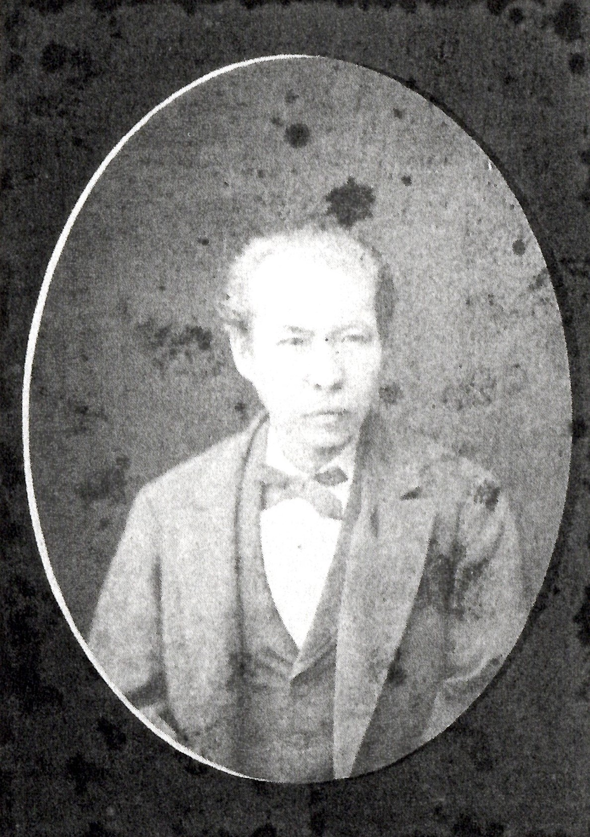 板倉勝弘の肖像写真。